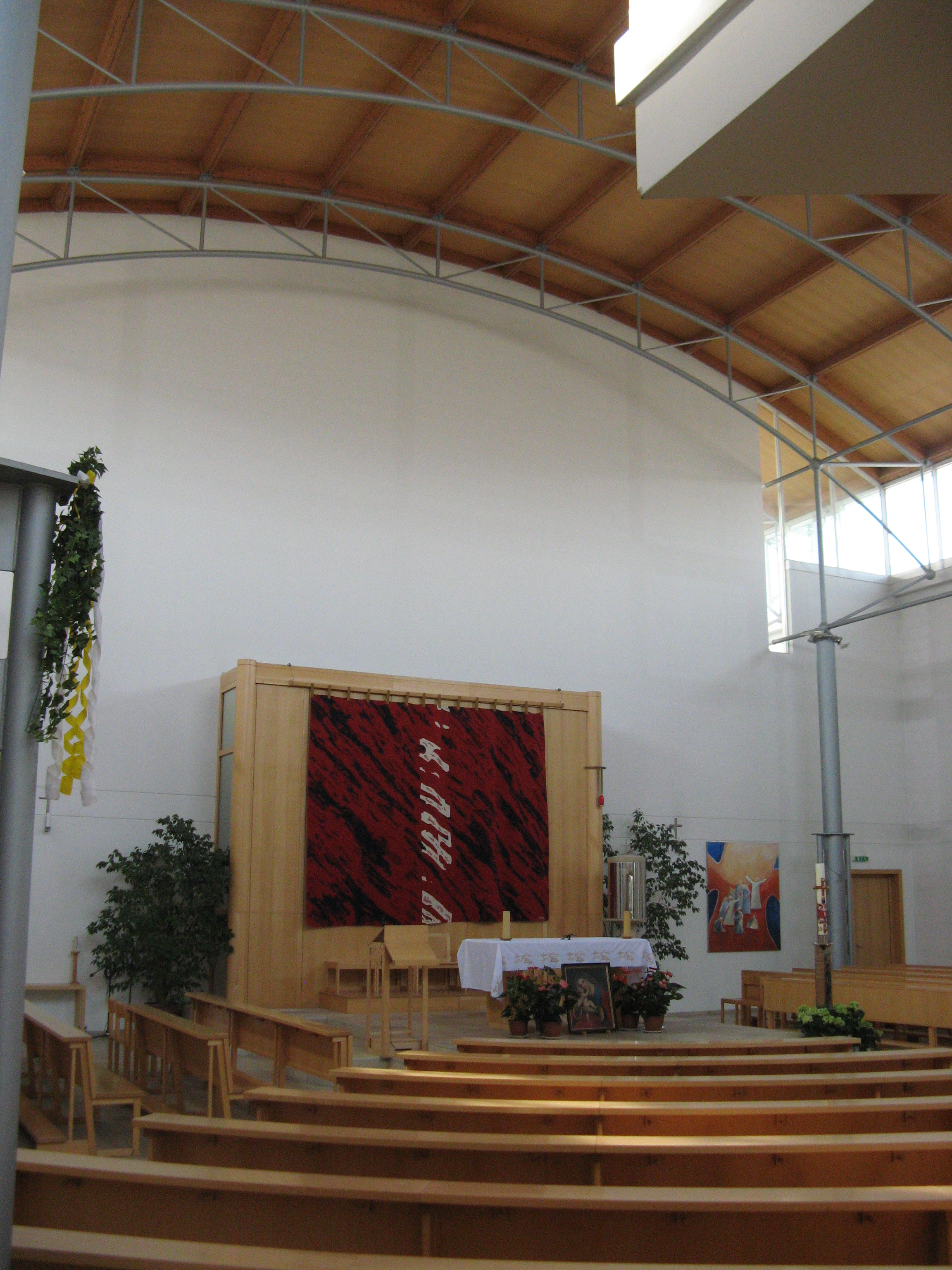 Emmaus am Wienerberg (1990-1992) von Otto Häuselmayer, Tesarekplatz 2, Wien-Favoriten